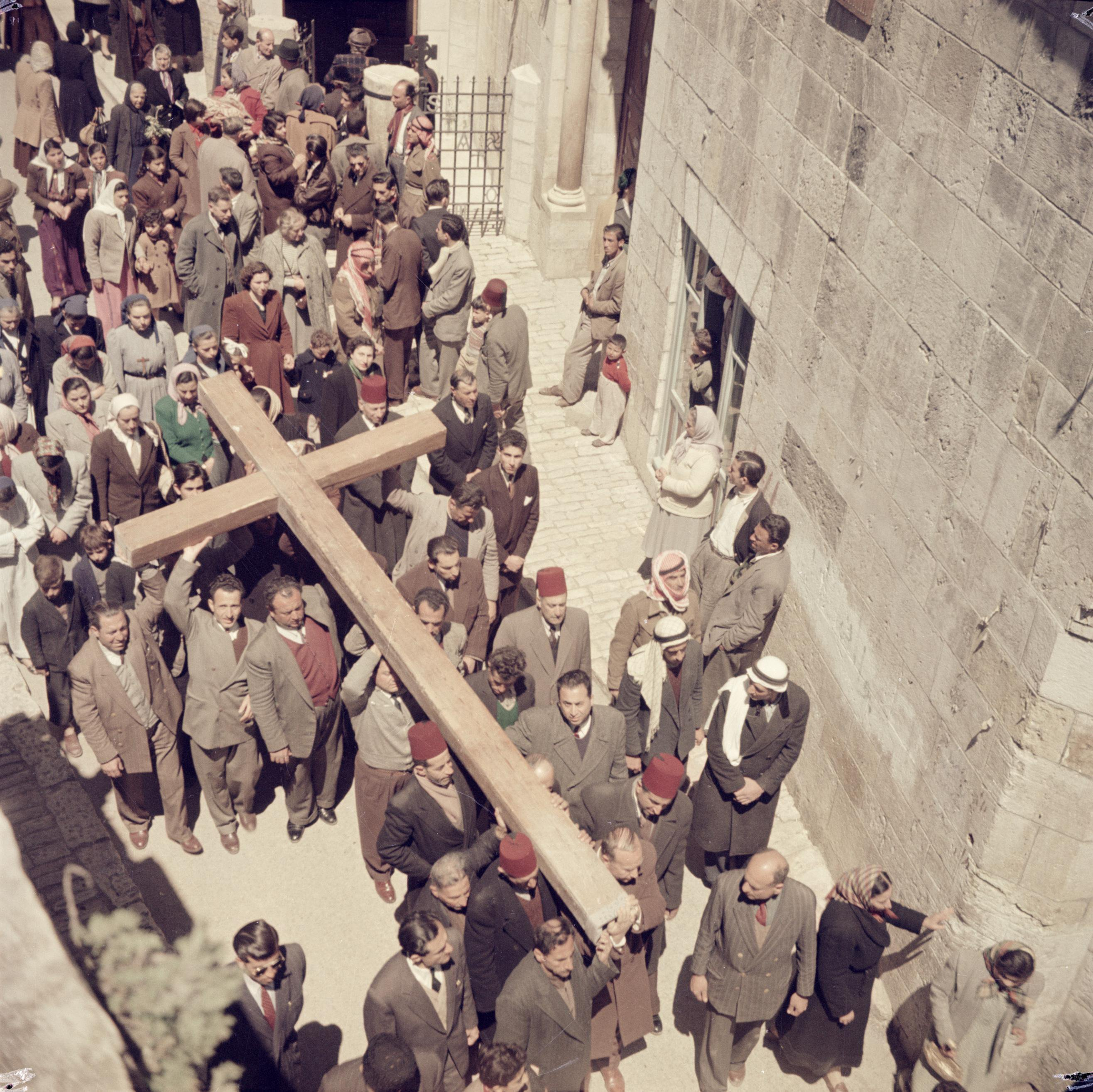 Collectie / Archief : Fotocollectie Van de Poll Reportage / Serie : Midden-Oosten 1950-1955: Jeruzalem Beschrijving : Jeruzalem. Pelgrims in een processie op Goede Vrijdag in de Via Dolorosa op weg naar de kerk van het Heilig Graf Annotatie : Ten tijde van de opname lag deze locatie in Jordanië Datum : 1950 Locatie : Israël, Jeruzalem, Jordanië, Via Dolorosa Trefwoorden : christendom, heiligdommen, kruisen, pelgrims, processies, religieuze feestdagen Fotograaf : Poll, Willem van de Auteursrechthebbende : Nationaal Archief Materiaalsoort : Negatief (zwart/wit) Nummer archiefinventaris : bekijk toegang 2.24.14.02 Bestanddeelnummer : 255-9769